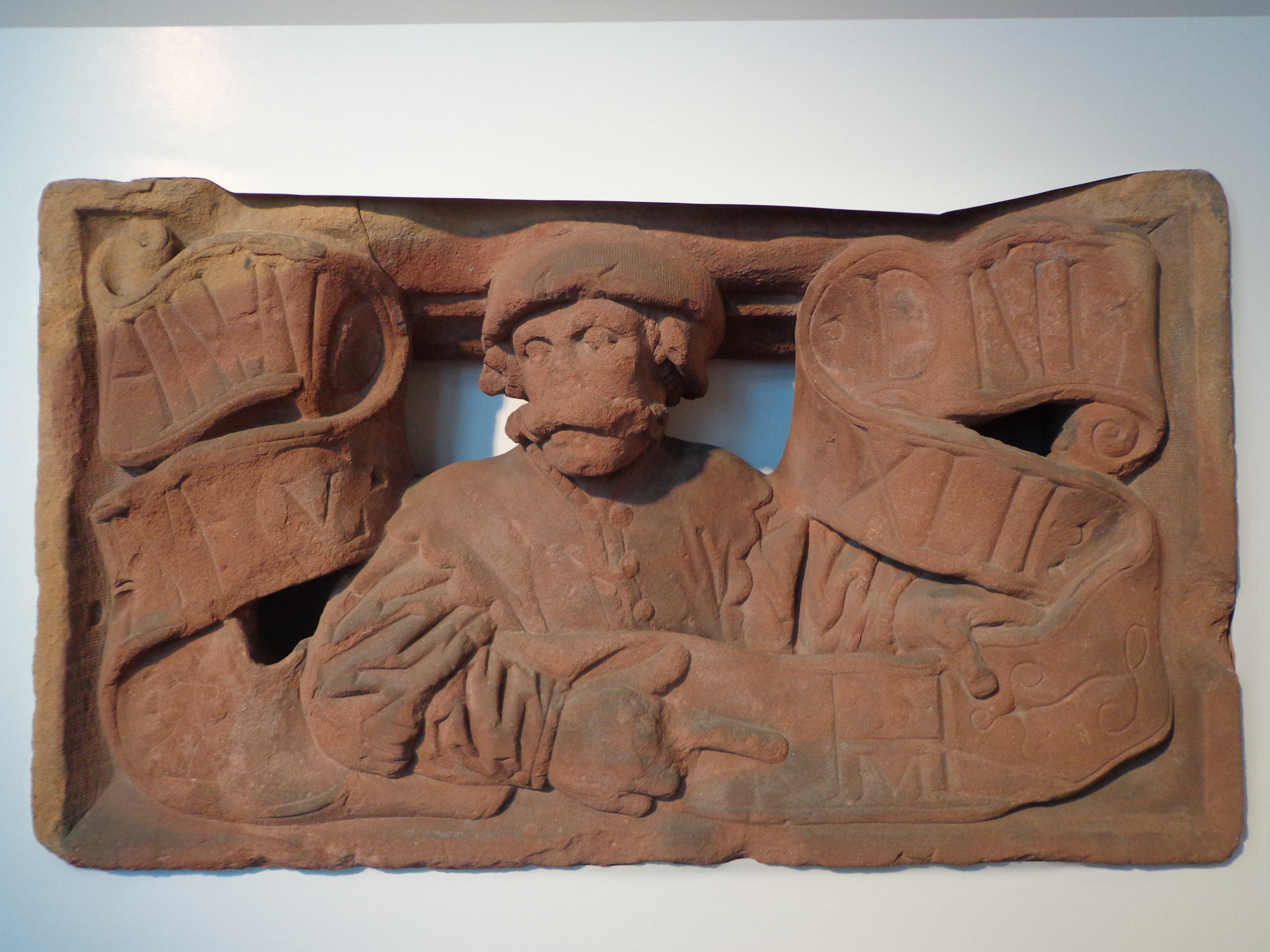 Buste de 1542 (autoportrait de Friedrich Hammer)